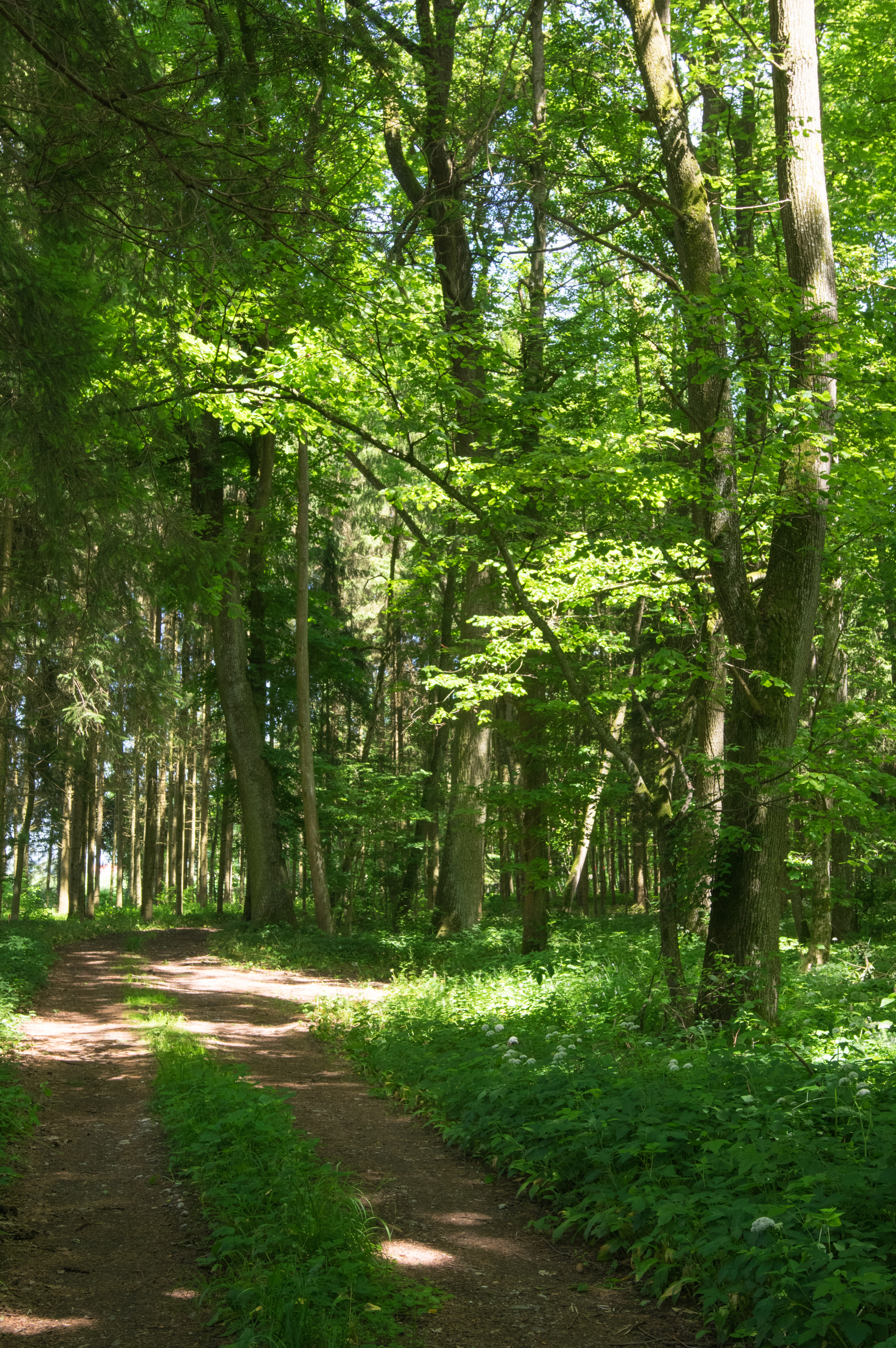 Weggabelung im Landschaftsschutzgebiet Gschwellhau im Landkreis Dillingen an der Donau, LSG LSG-00373.01